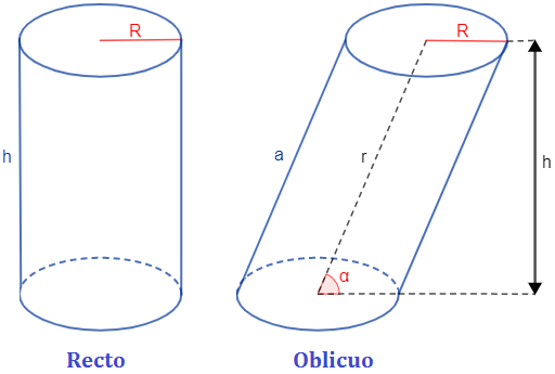 Representación de un cilindro recto y de un cilindro oblicuo con base circular, ambos de altura h y radio R. El cilindro oblicuo tiene lado a y un ángulo de inclinación α.